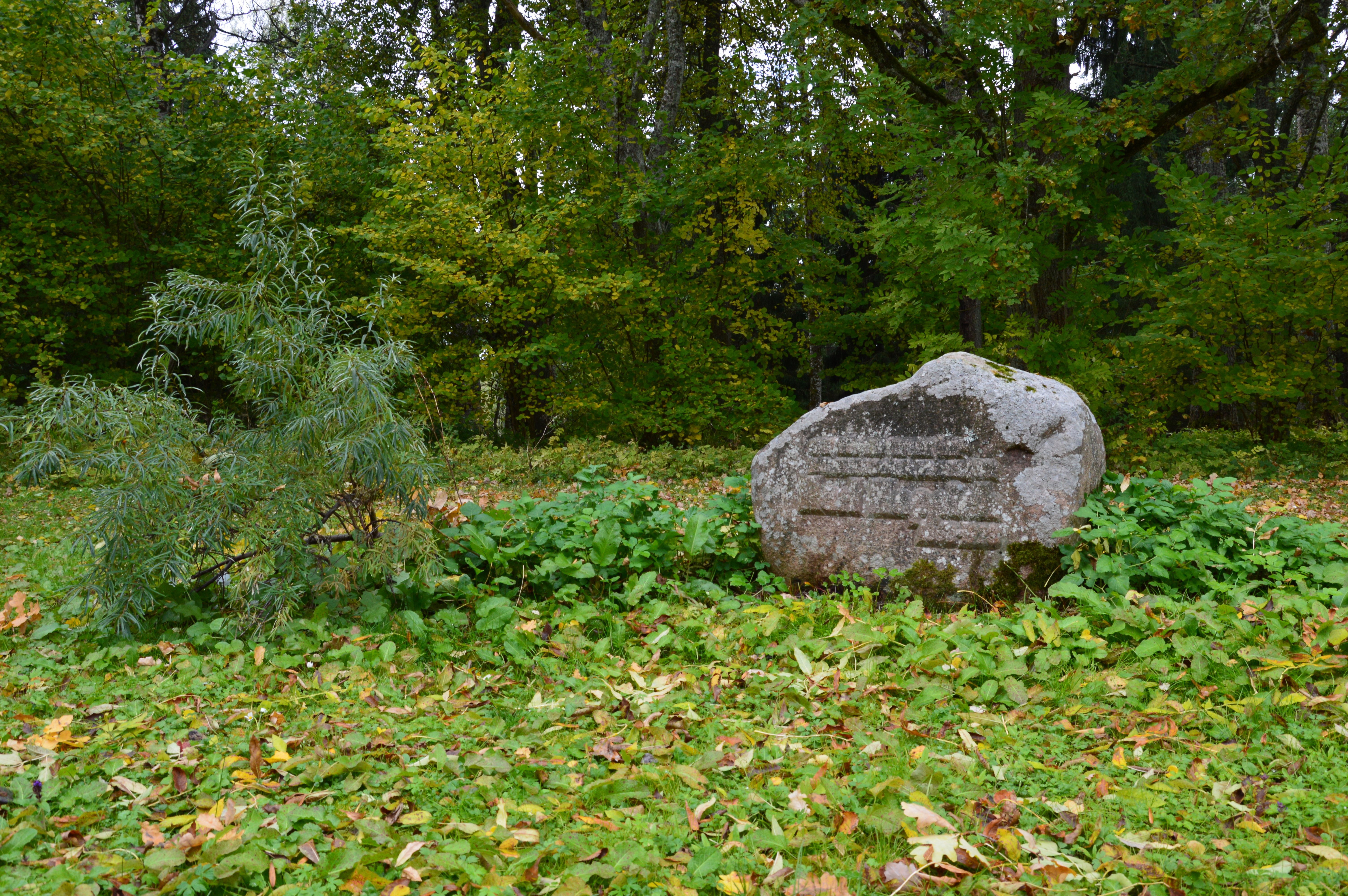 Karl Happichi mälestuskivi Pootsiku külas